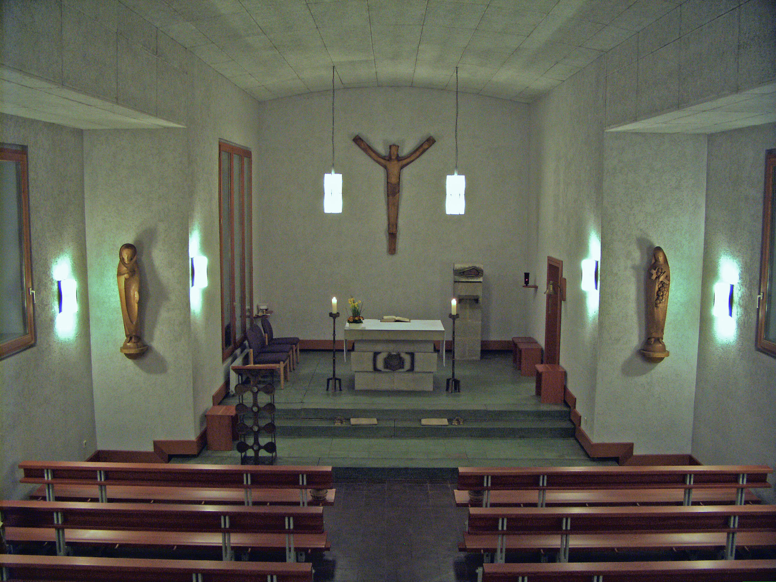 Katholische Kirche St. Theresia vom Kinde Jesu in Cremlingen, Landkreis Wolfenbüttel